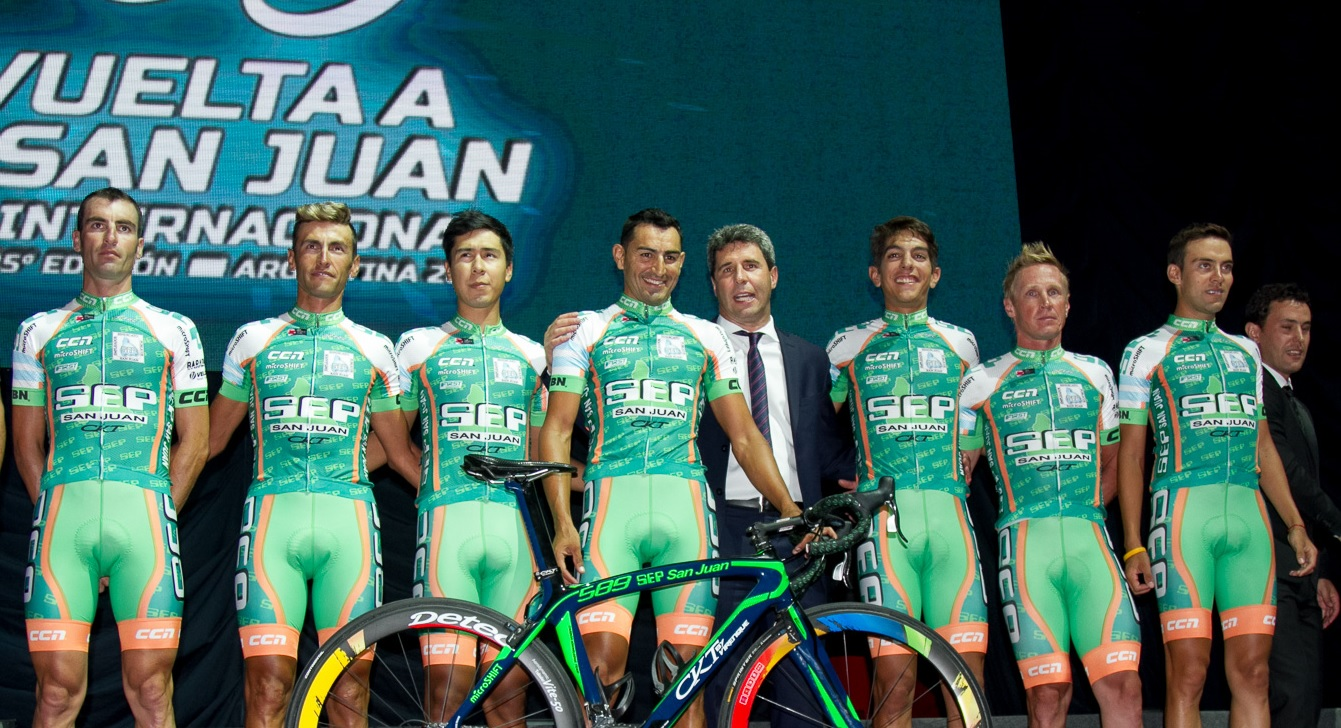 Vuelta a San Juan 2017 - Equipo Sindicato de Empleados Públicos de San Juan (Argentina) Depicted team: Sindicato de Empleados Públicos de San Juan